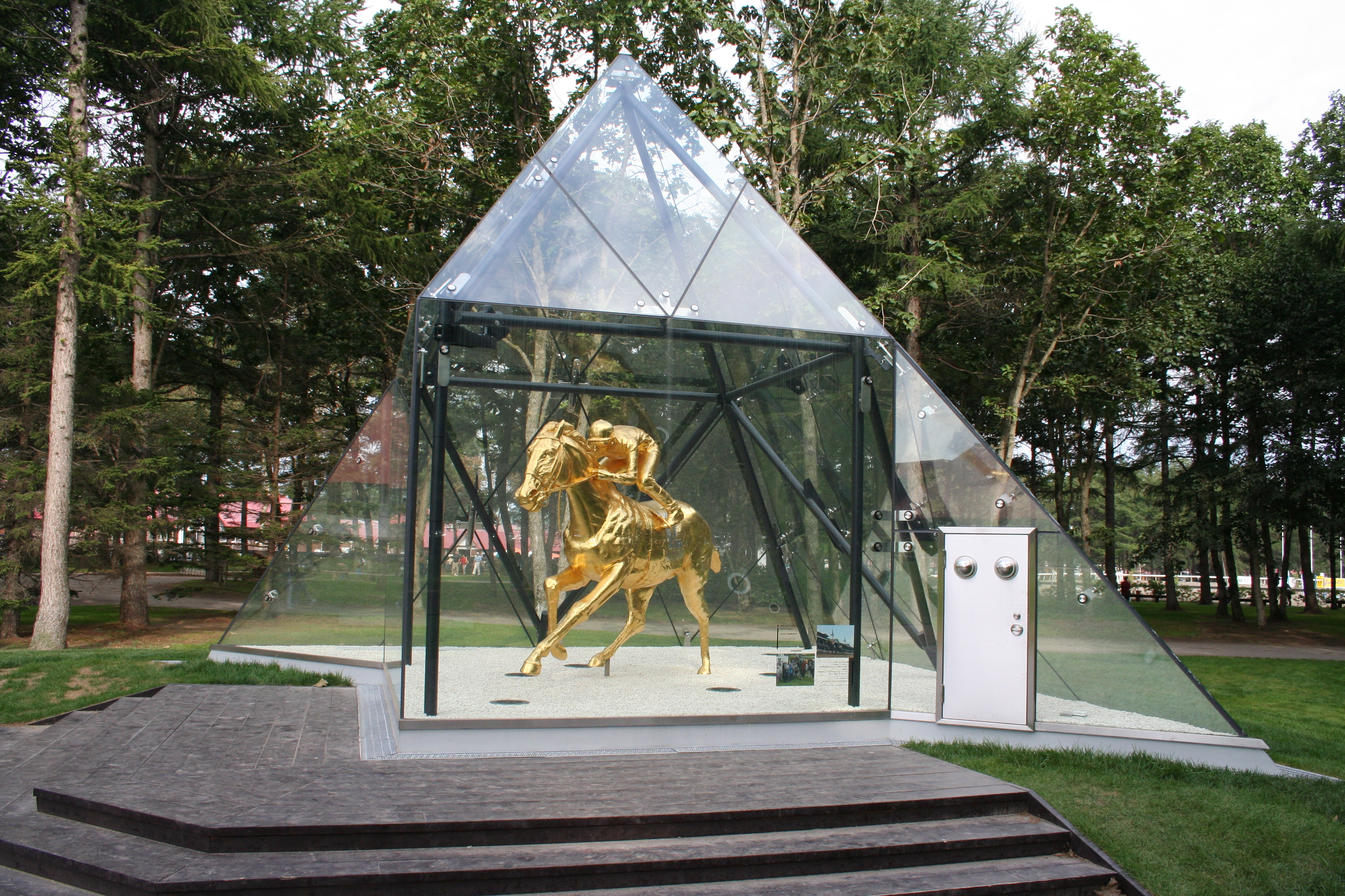 Statue of Fusaichi Pegasus（フサイチペガサス）,北海道苫小牧市で撮影